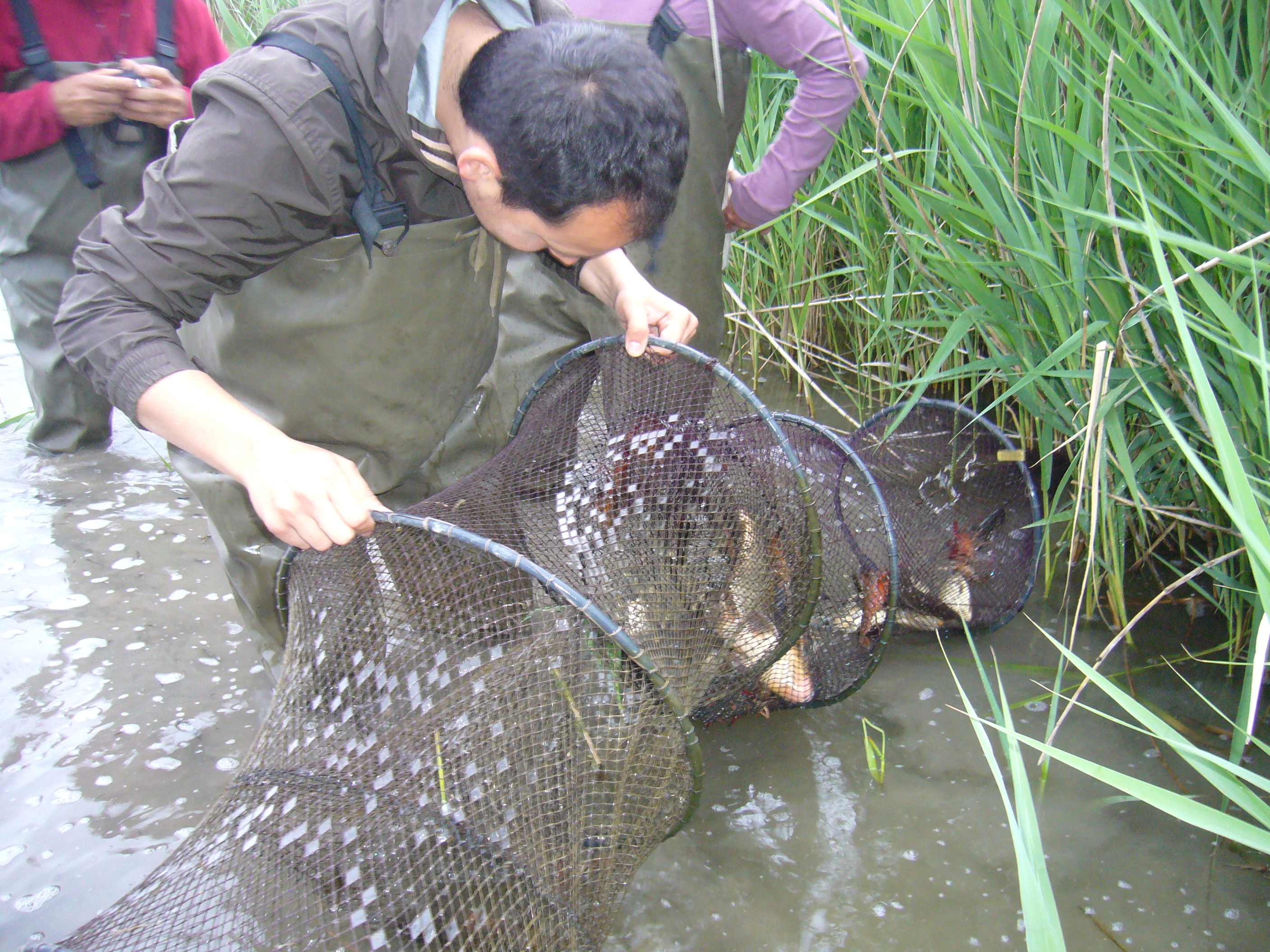 Voluntariat ambiental per al seguiment de la tortuga d'estany a la Marjal de Rafalell i Vistabella, instal·lant mornell